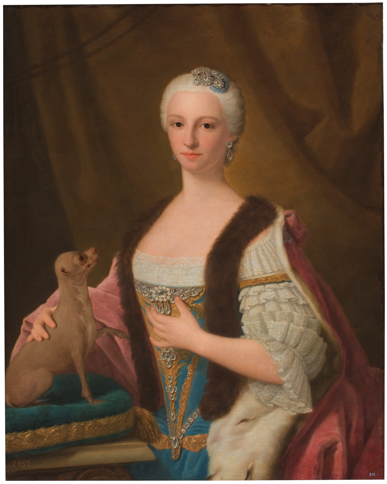 María Antonia Fernanda de España, esposa de Vittorio Amadeo III